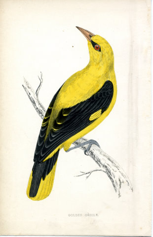 "Golden Oriole" Baxter print c1880